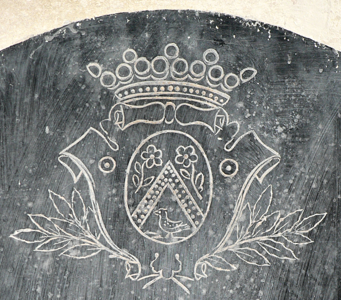 des Gibert seigneurs de Rosoy